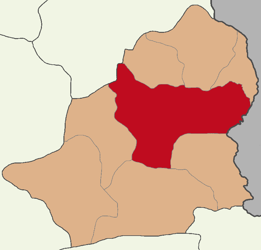 Kars Merkez ilçesinin konumu